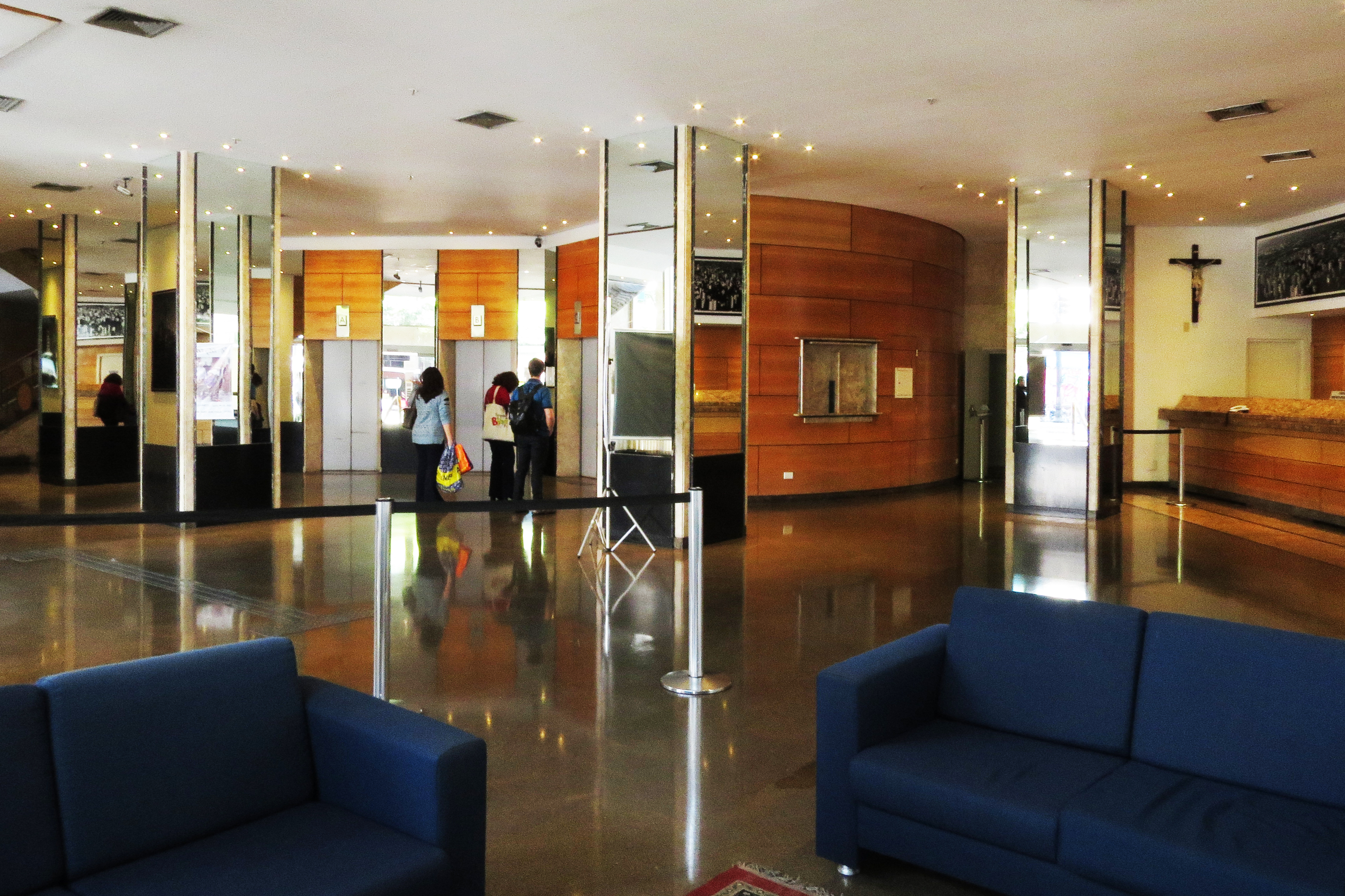 Saguão principal do edifício do Tribunal de Justiça de São Paulo.